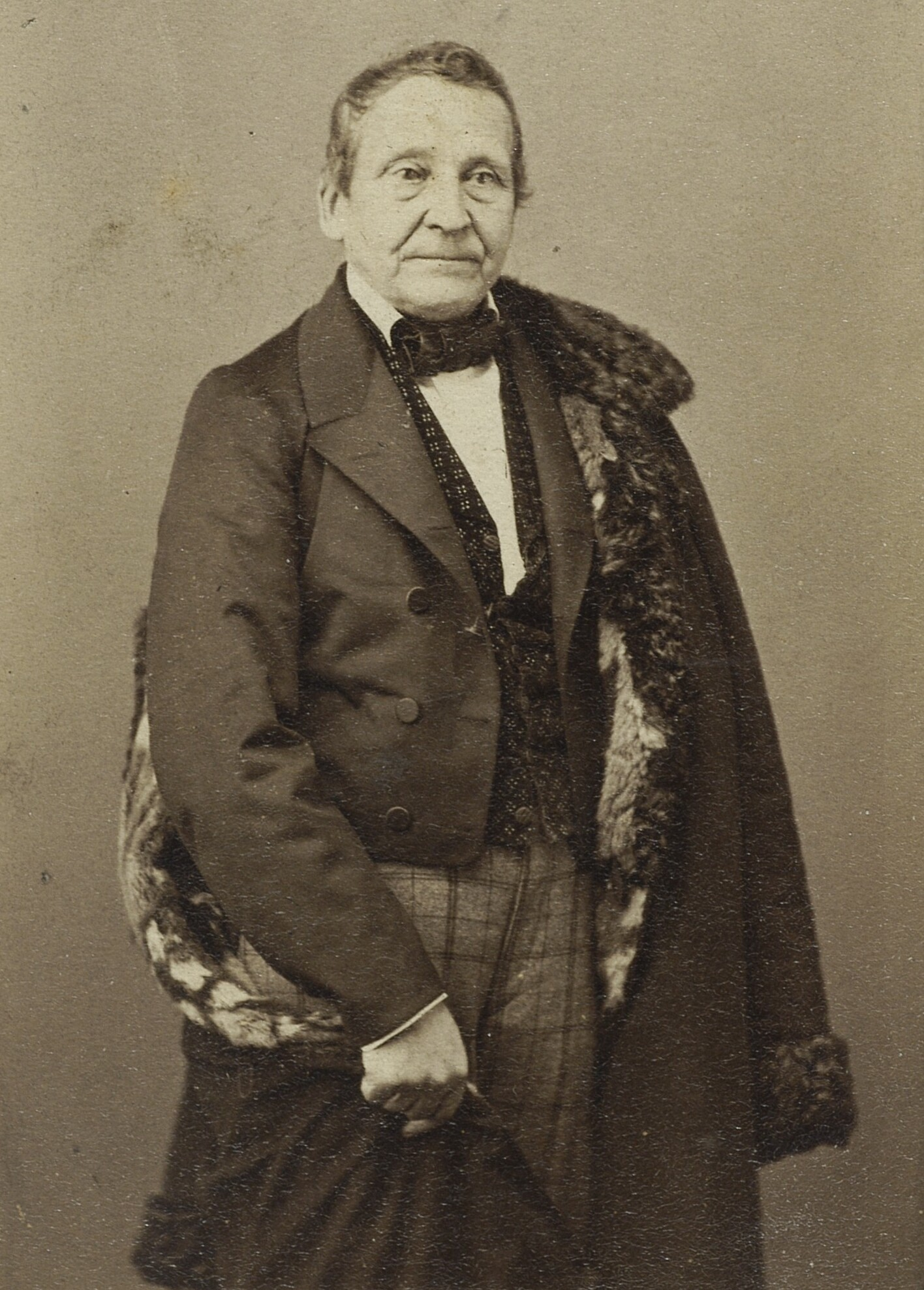 Antoni Oleszczyński, 1863 r.